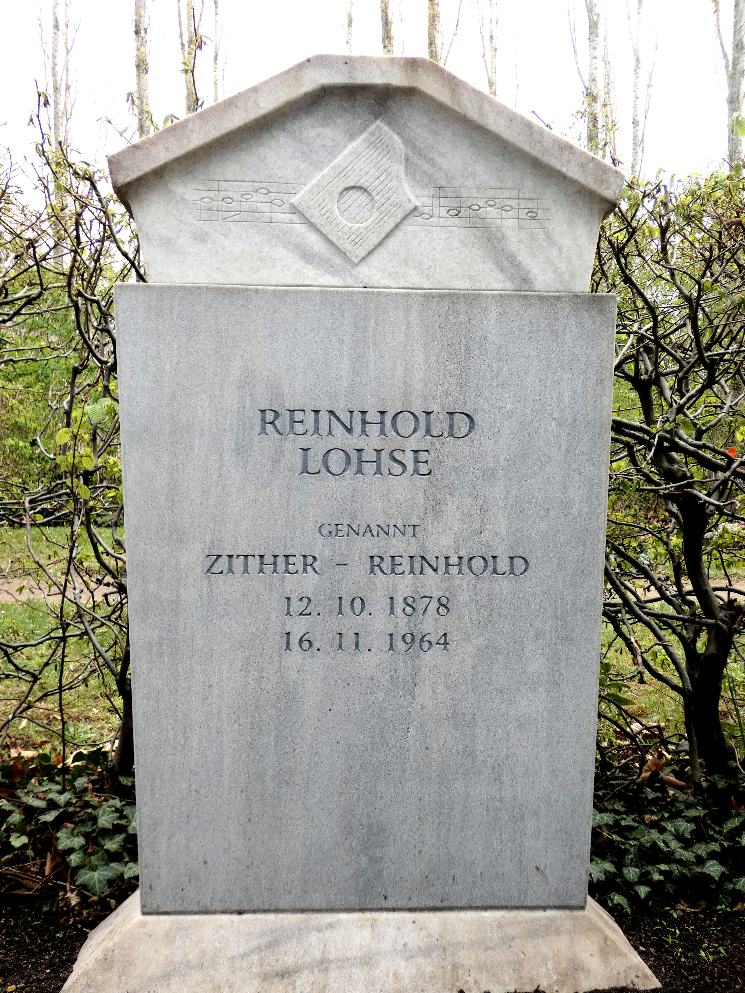 Grabstätte Reinhold Lohse, gen. Zither-Reinhold, Gertraudenfriedhof Halle (Saale), Abt.9, Urnenwahlstelle 141